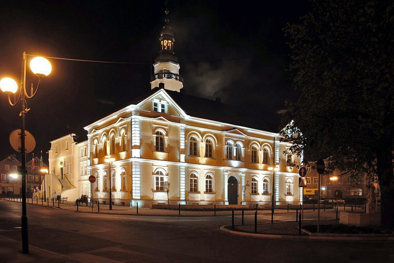 Mirsk, pl. Wolności 39 - ratusz, XVIII